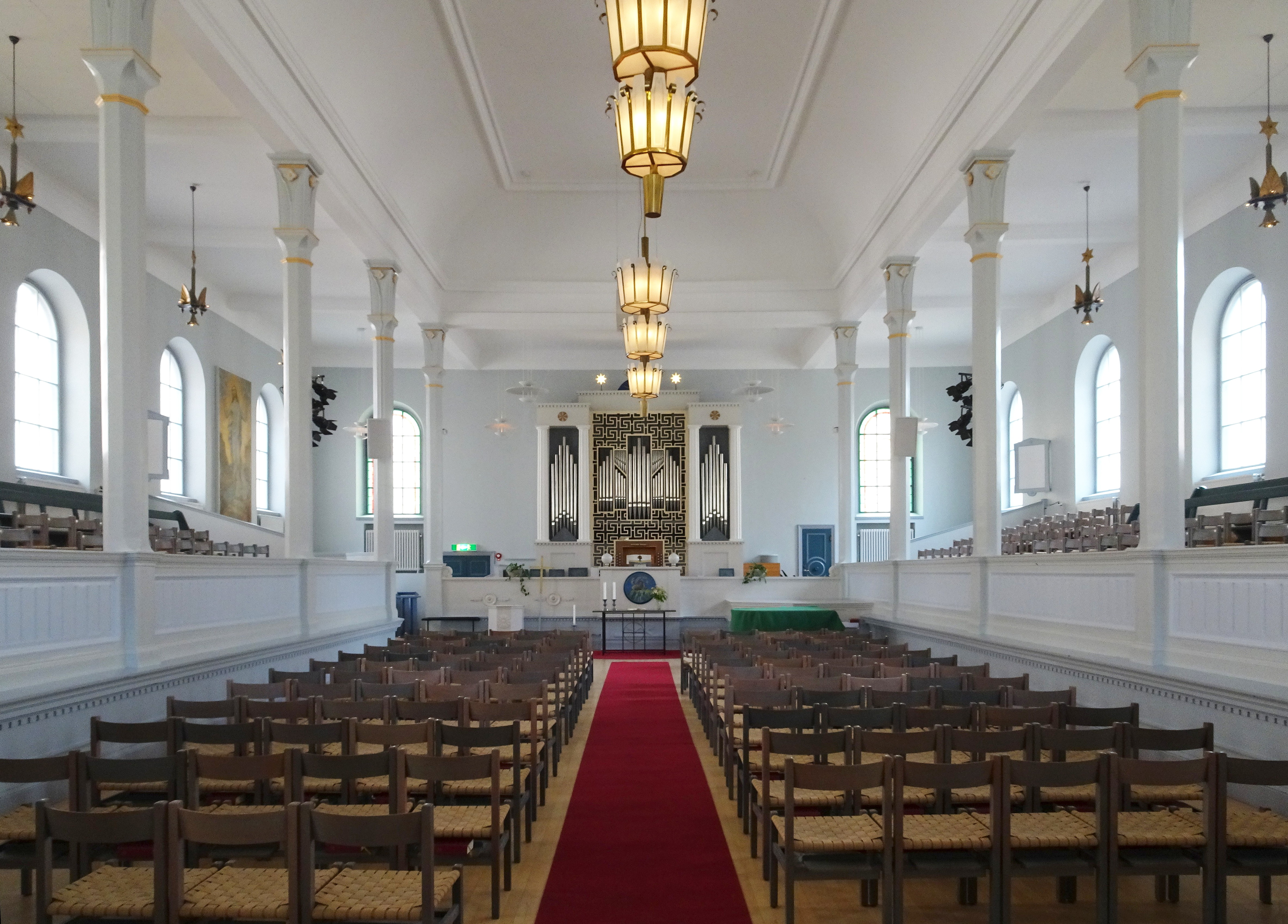 Andreaskyrkan, Stockholm, interiör